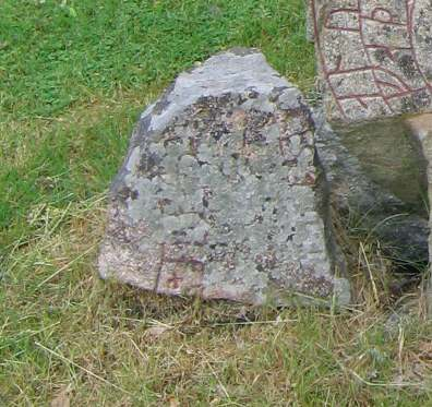 Runestone U 242, Vallentuna.